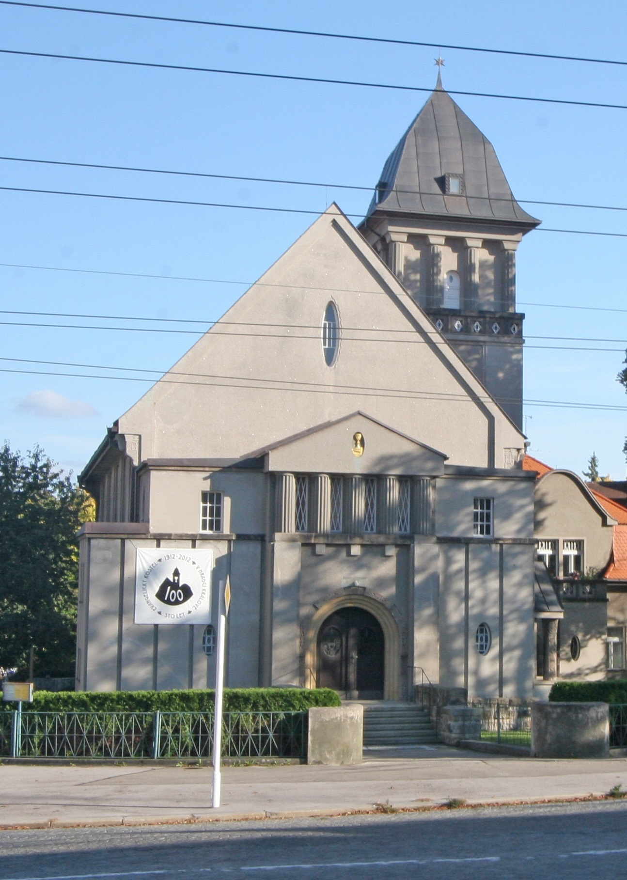 Oldřich Liska: Kostel evangelický českobratrský (Hradec Králové), Hradec Králové 529